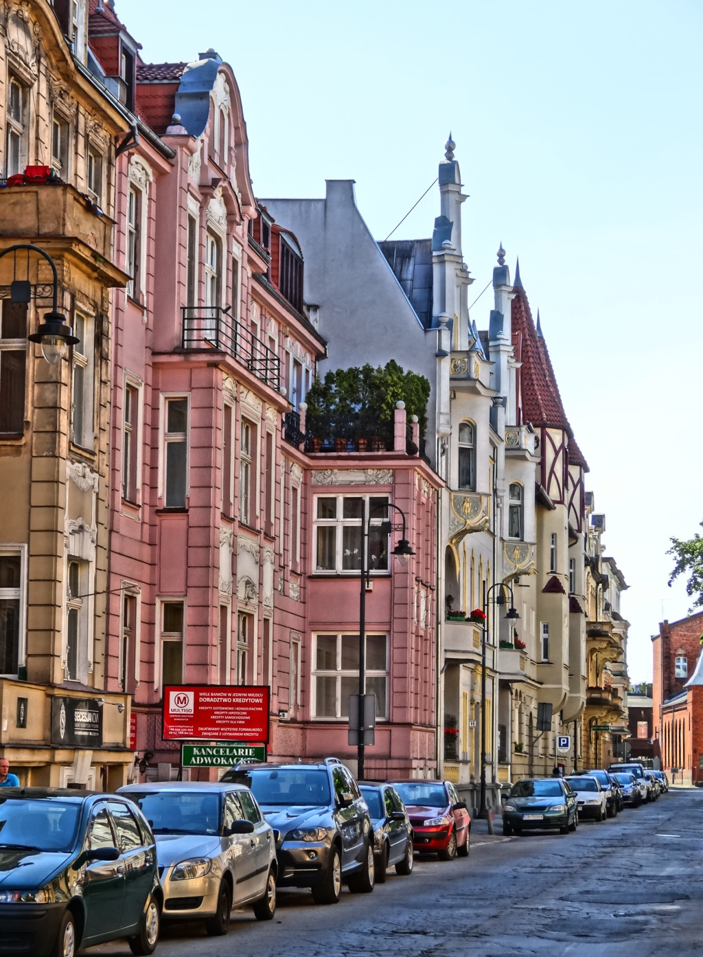 Ulica Augusta Cieszkowskiego w Bydgoszczy – pierzeja południowa